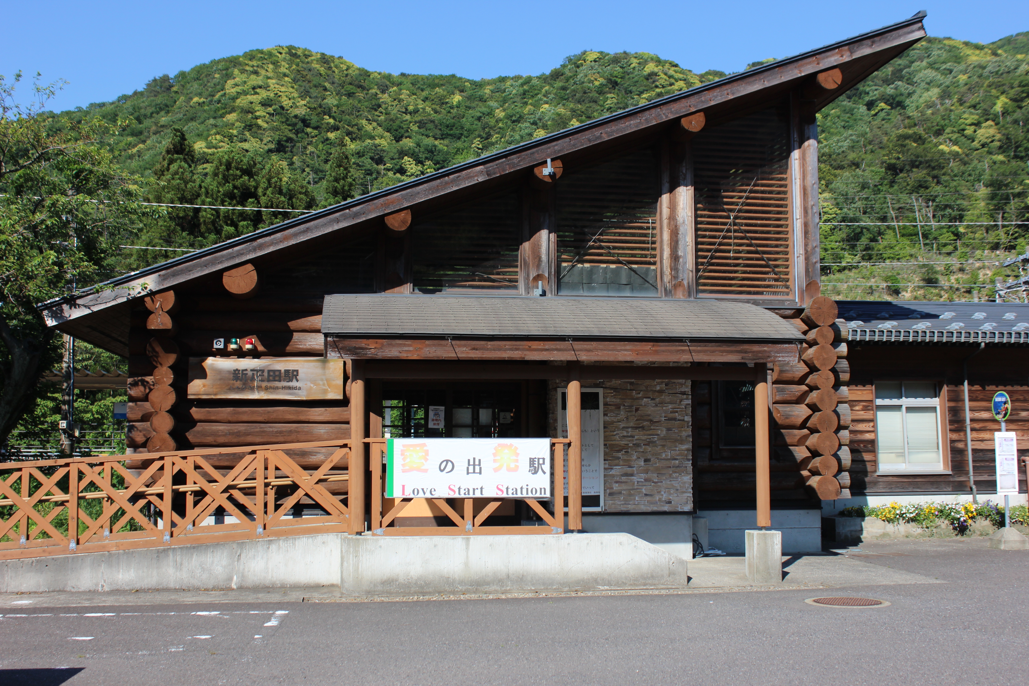 新疋田駅（2020年撮影） Canon EOS Kiss X5